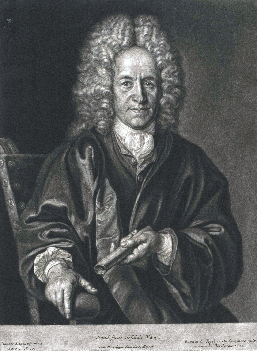 Christoph Weigel der Ältere (1654–1725), Stich von Bernhard Vogel nach Johann Kupetzky